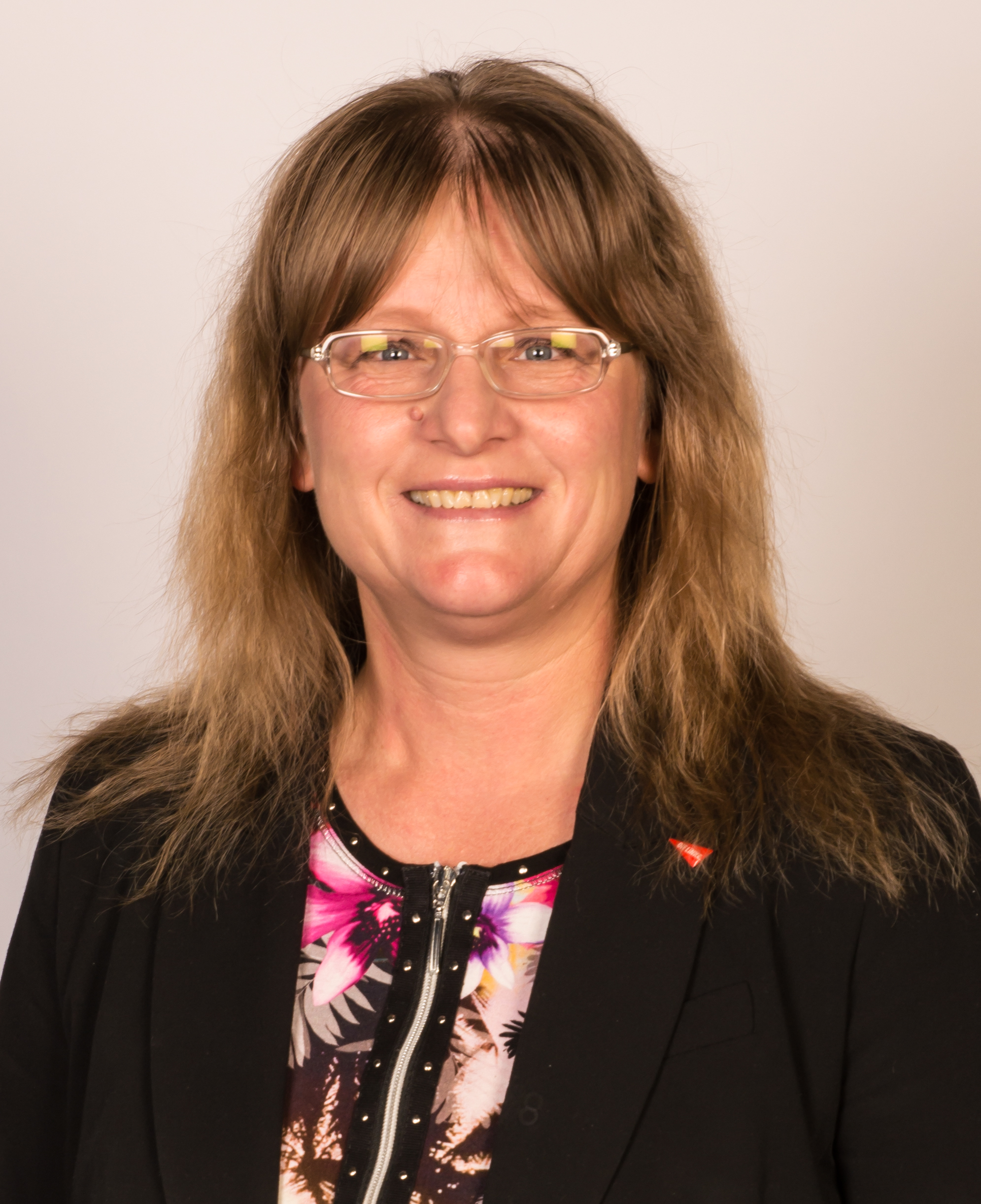 Bundesparteitag DIE LINKE Mai 2014 in Berlin, Velodrom, Mitglied des Parteivorstandes 2014 - 2016